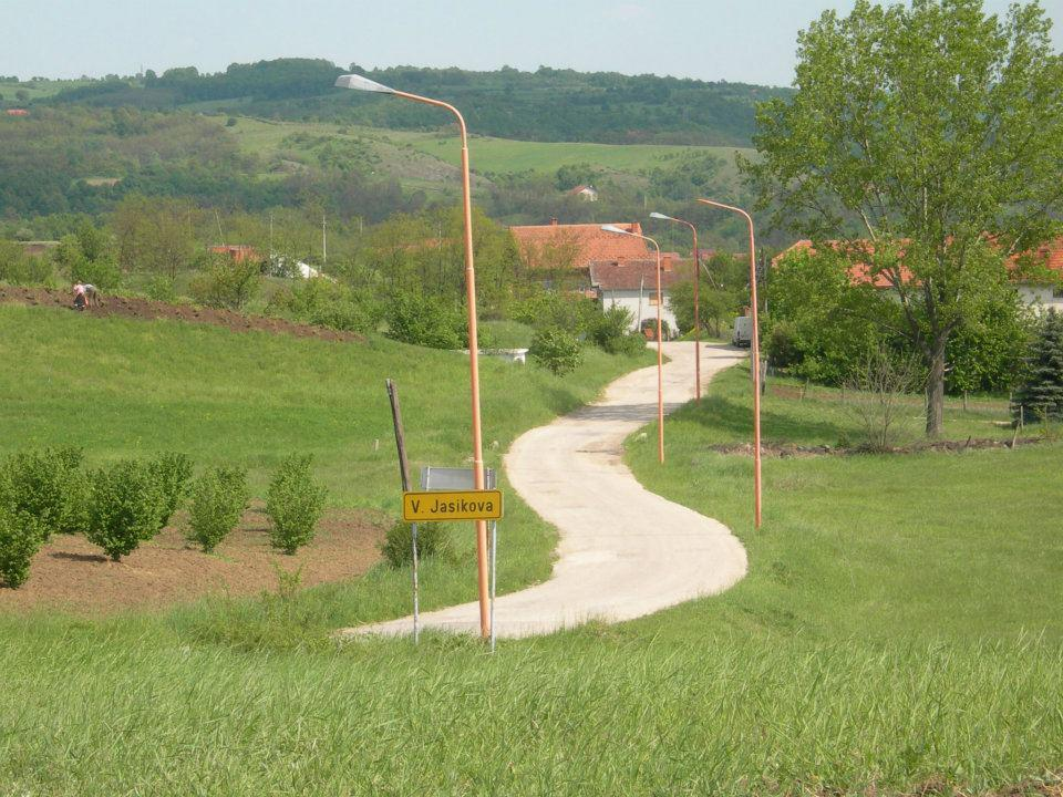 Ulaz u selo. Zoran Janicijeivc. Privatna arhiva.